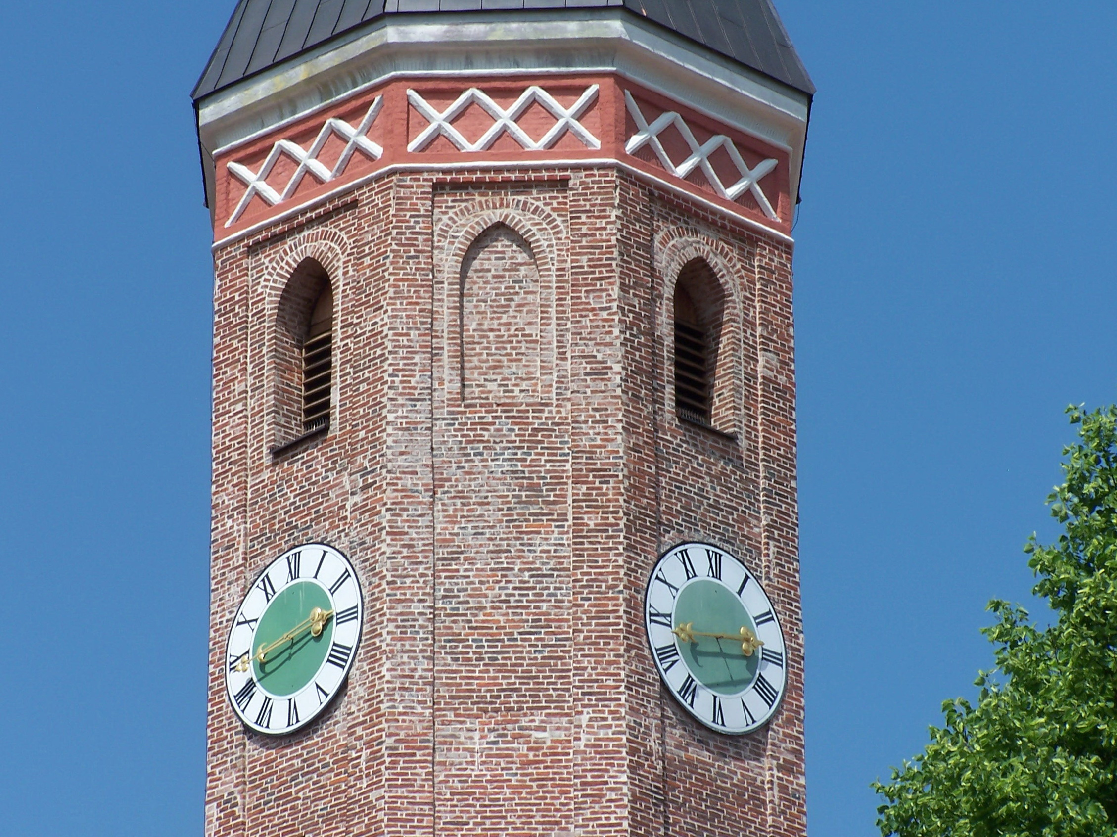 Pfeffenhausen, Kirchplatz 16. Katholische Pfarrkirche St. Martin. Neugotische Basilika, Blankziegelbau, nach Planung des königlichen Baumamtmanns Anton Völkl, 1885-87, Turmuntergeschoss vom spätgotischen Vorgängerbau des 15. Jahrhunderts übernommen, Gliederung durch Strebenpfeiler, Fries und Sockel, nördlich Chorflankenturm mit Geschossgliederung, achteckigem Aufsatz und Spitzhelm.